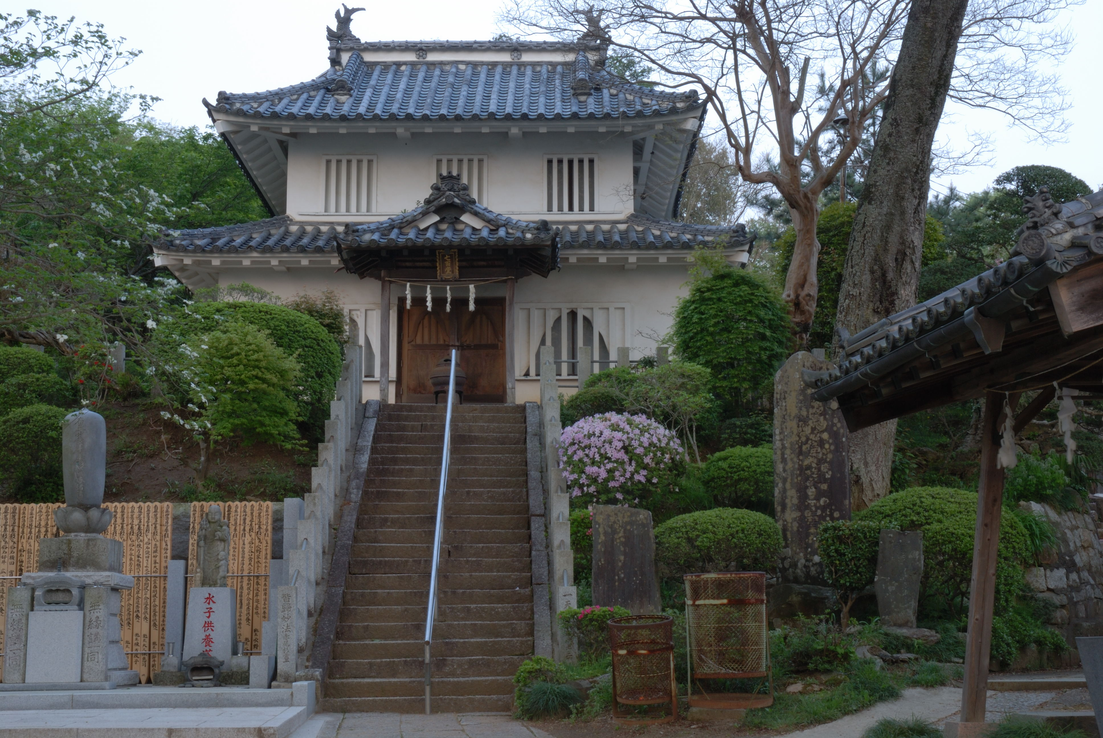 Hachimandaiyagura